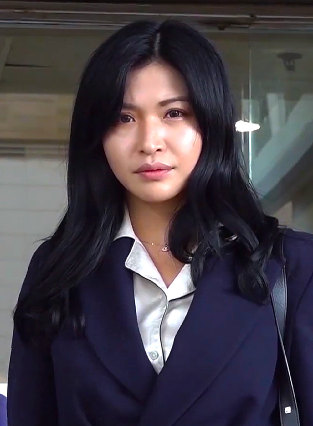 中文（香港）: 陳偉琪就一項「酒後駕駛」罪於東區裁判法院應訊